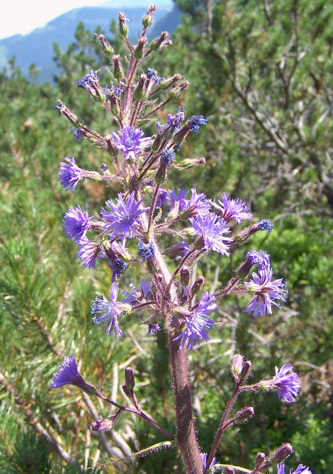 Mulgedium alpinum (pl. modrzyk górski), habitat: Tatra Mountains, Dolina Roztoki